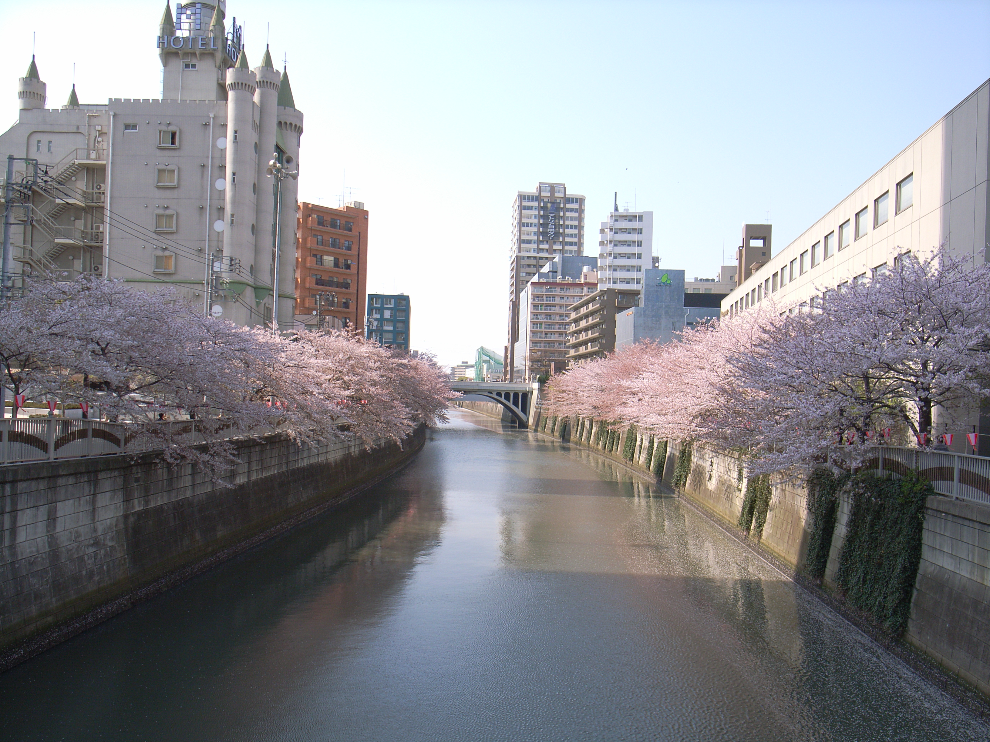 左に見えるのは、バブル世代には有名らしい、目黒エンペラー [1] note 1 note 2